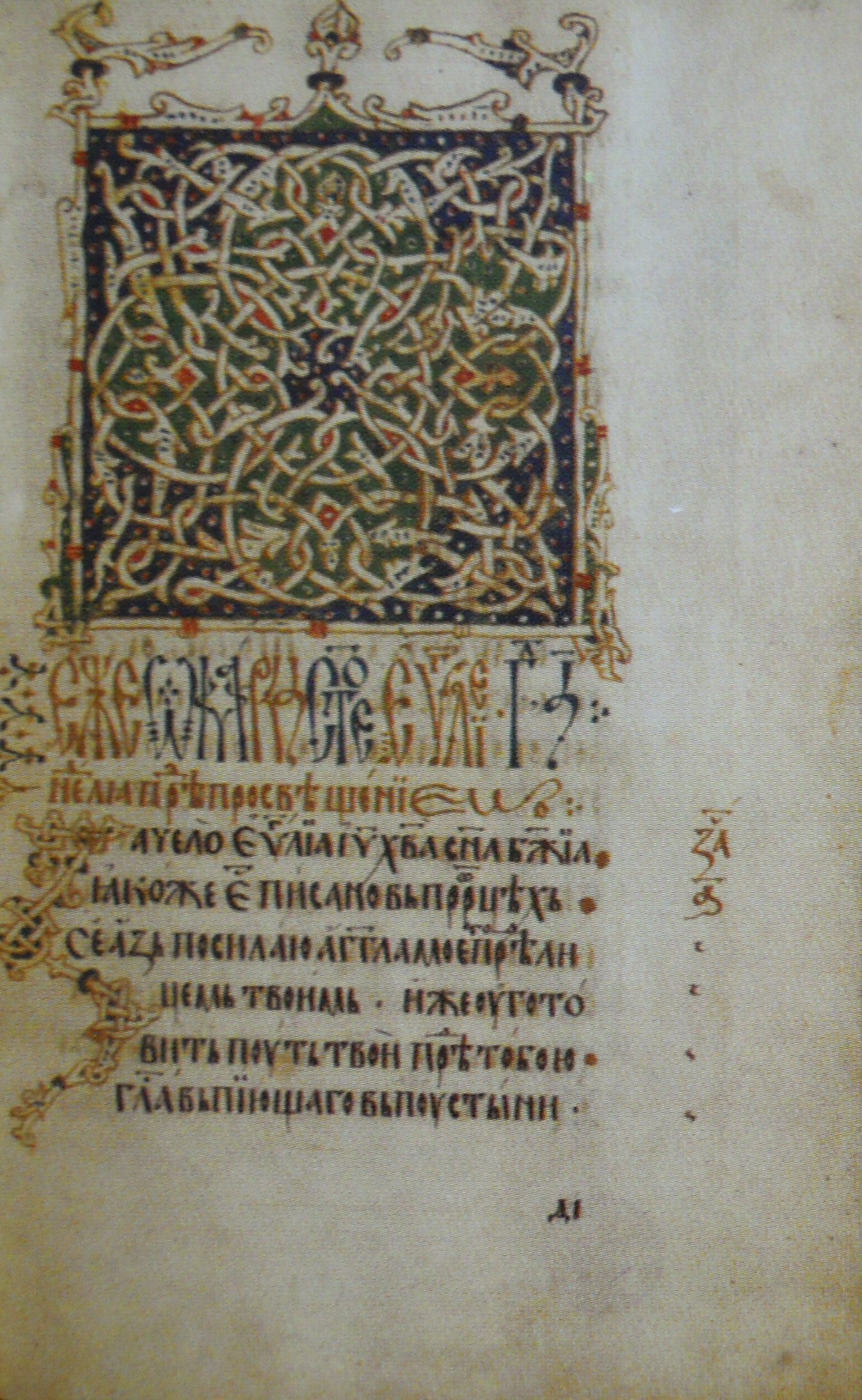 Српски (ћирилица): Витовничко Јеванђеље